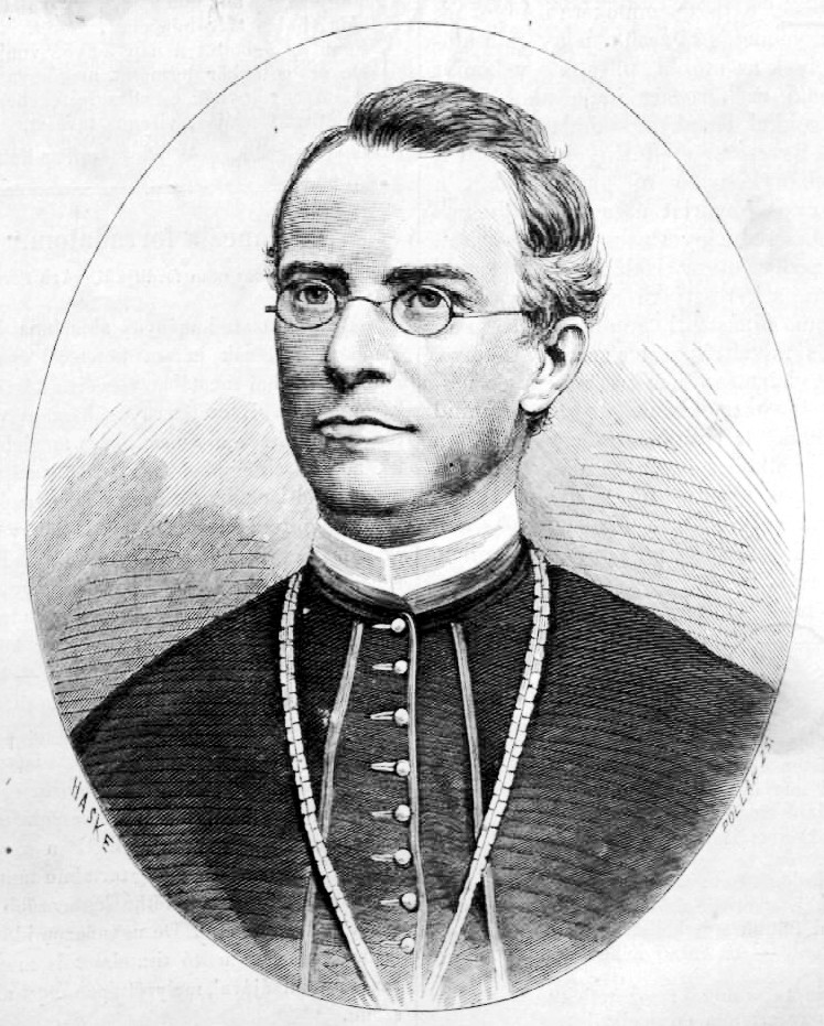 Dulánszky Nándor (1829–1896) pécsi püspök portréja. Pollák Zsigmond metszete Haske rajza alapján